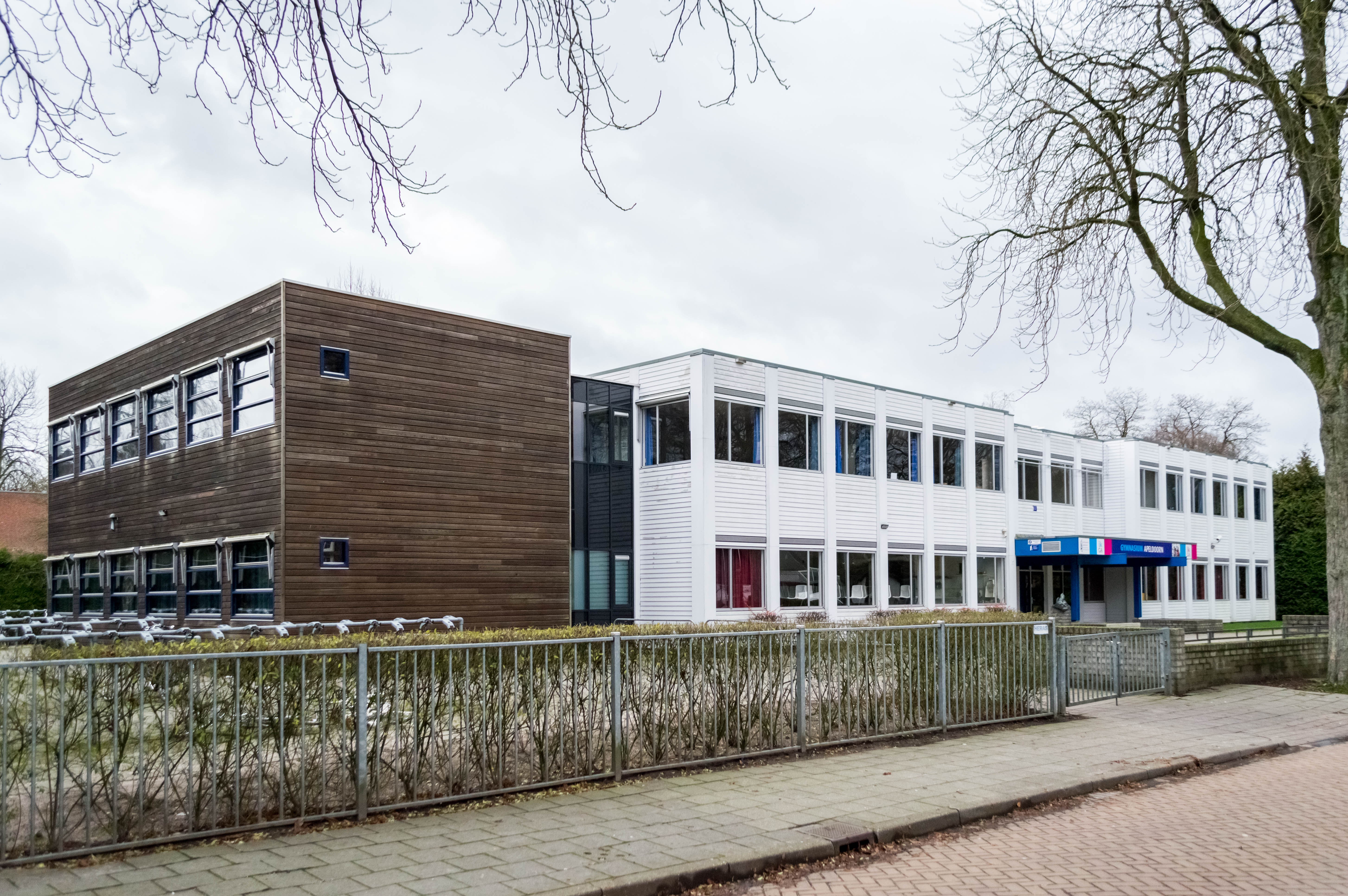 De K17 of "Suikerklont" van het Gymnasium Apeldoorn.